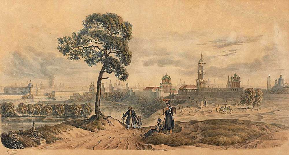 (aus "Blätter aus meinem Portefeuille im Laufe des Feldzuges 1812 in Rußland an Ort und Stelle gezeichnet", Verlegt von E. Emminger bei Ch. F. Autenrieth